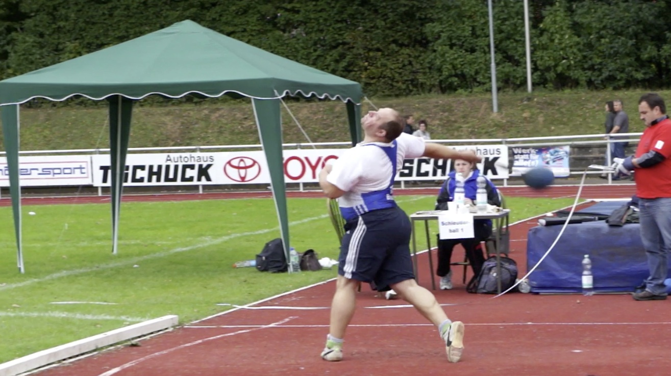 Drehtechnik Schleuderball. Abwurf des Schleuderball. Martin Michael Schmidt,TSG Bruchsal. Mehrfacher Badischer Meister (Jugend/ Männer) sowie Deutscher Meister in der Jugend mit 73,79m 1kg. In den Deutschen Ewigenbestenliste bei den Männern (1,5kg) steht er auf Platz 60.